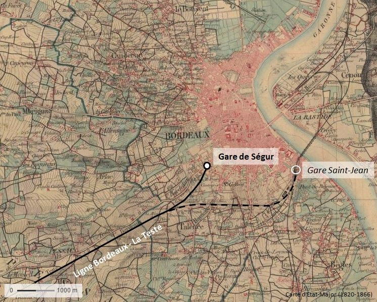 gare de Ségur dans son cadre urbain (Etat-Major)